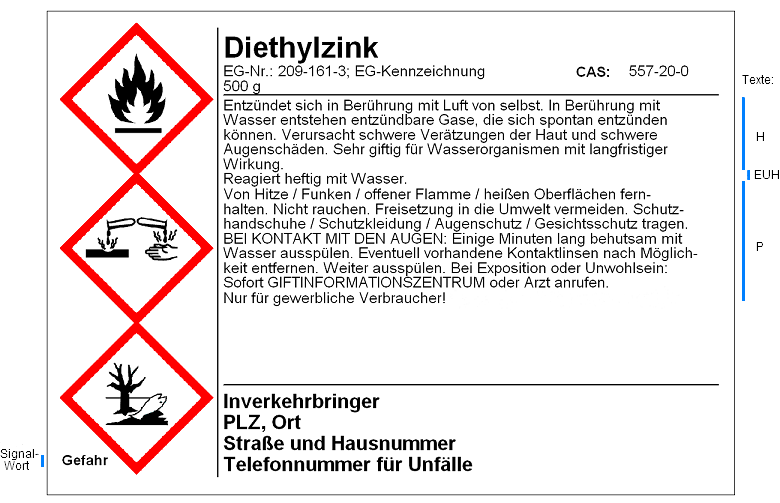 Gefahrstoffetikett gemäß GHS (GHS-Label)